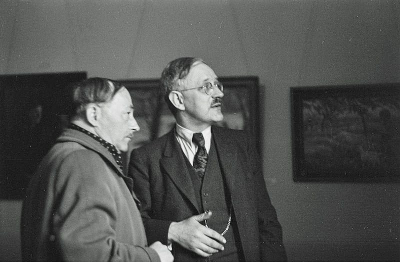 Original image description from the Deutsche Fotothek Max Schwimmer und Conrad Felixmüller vor Gemälden